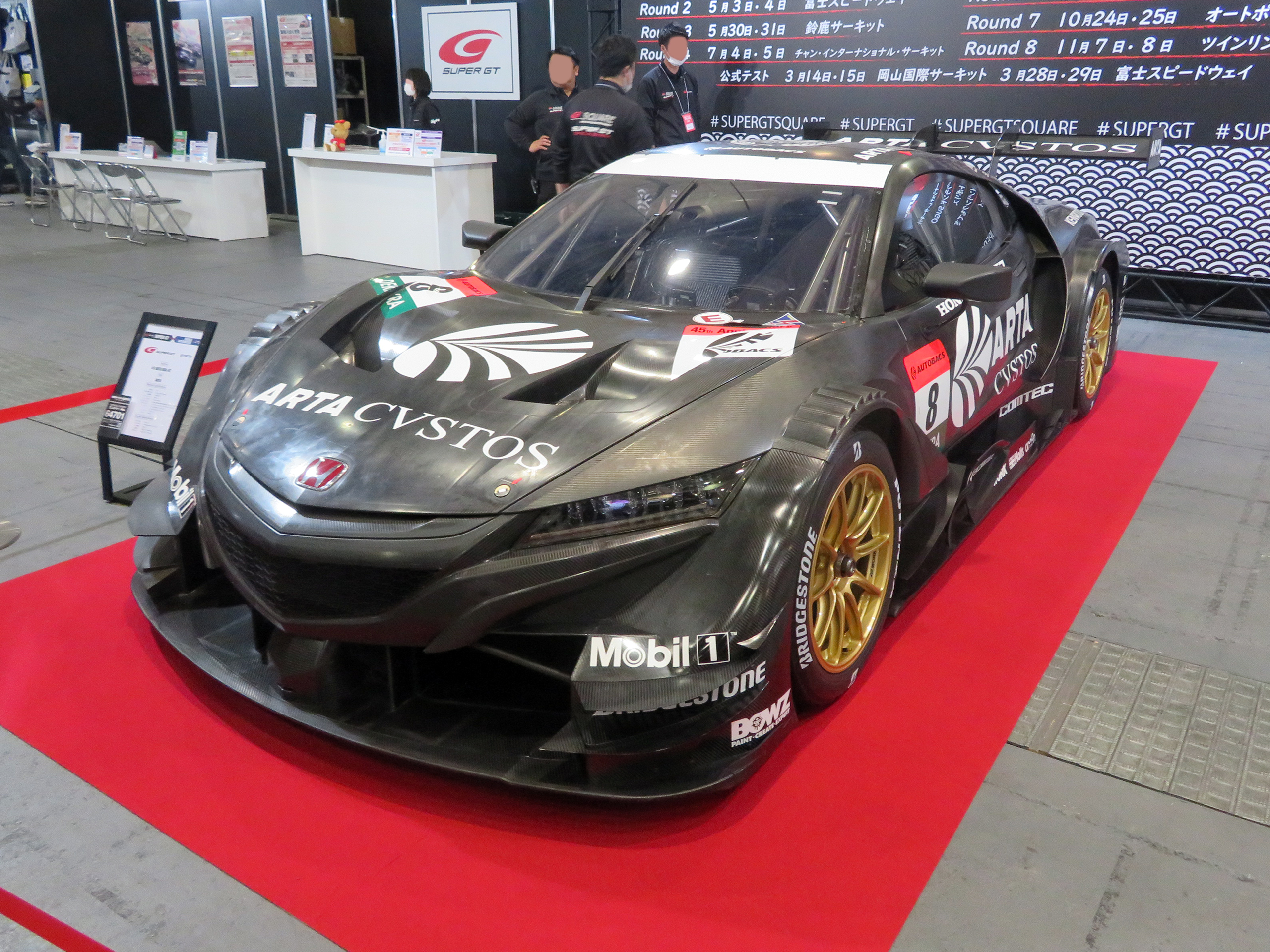 大阪オートメッセ2020に於いて8号車ARTA NSX-GTの2019年SUPER GT×DTM特別交流戦仕様を撮影。